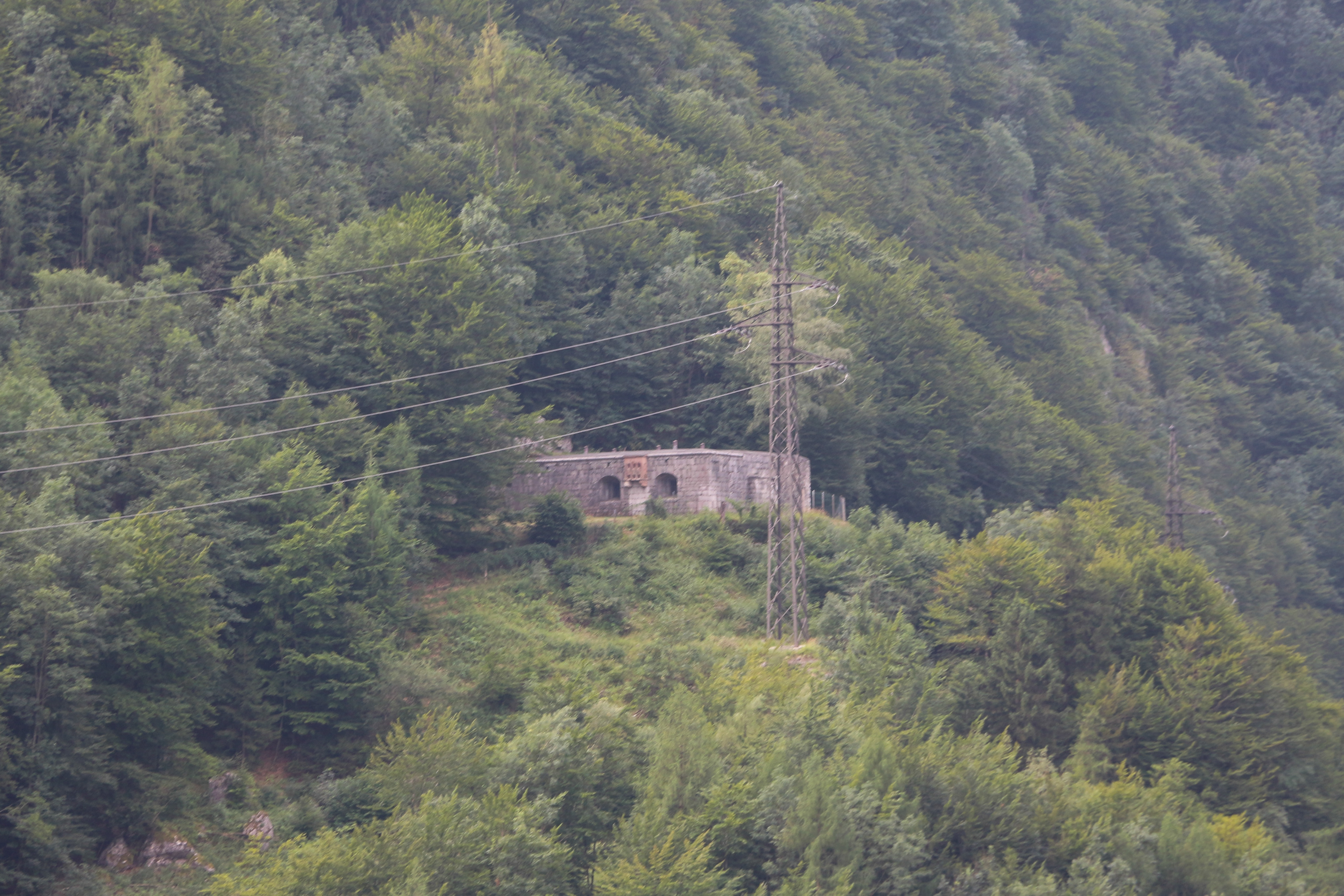 Passanlage und -befestigung, Pass Lueg Golling im Salzachtal